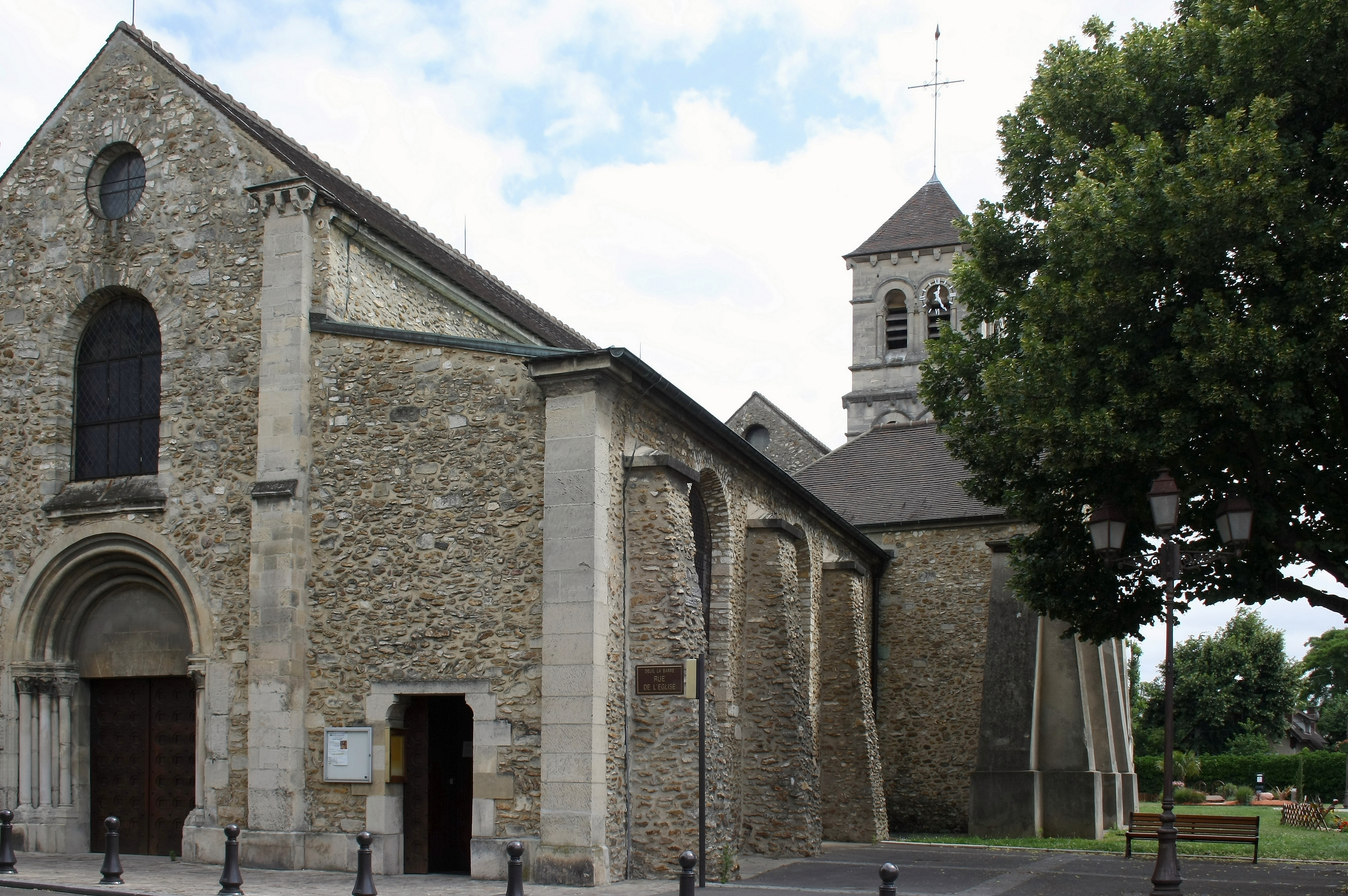 Katholische Kirche Notre-Dame in Deuil-la-Barre, einer Gemeinde im Département Val-d'Oise (Île-de-France), Ansicht von Westen